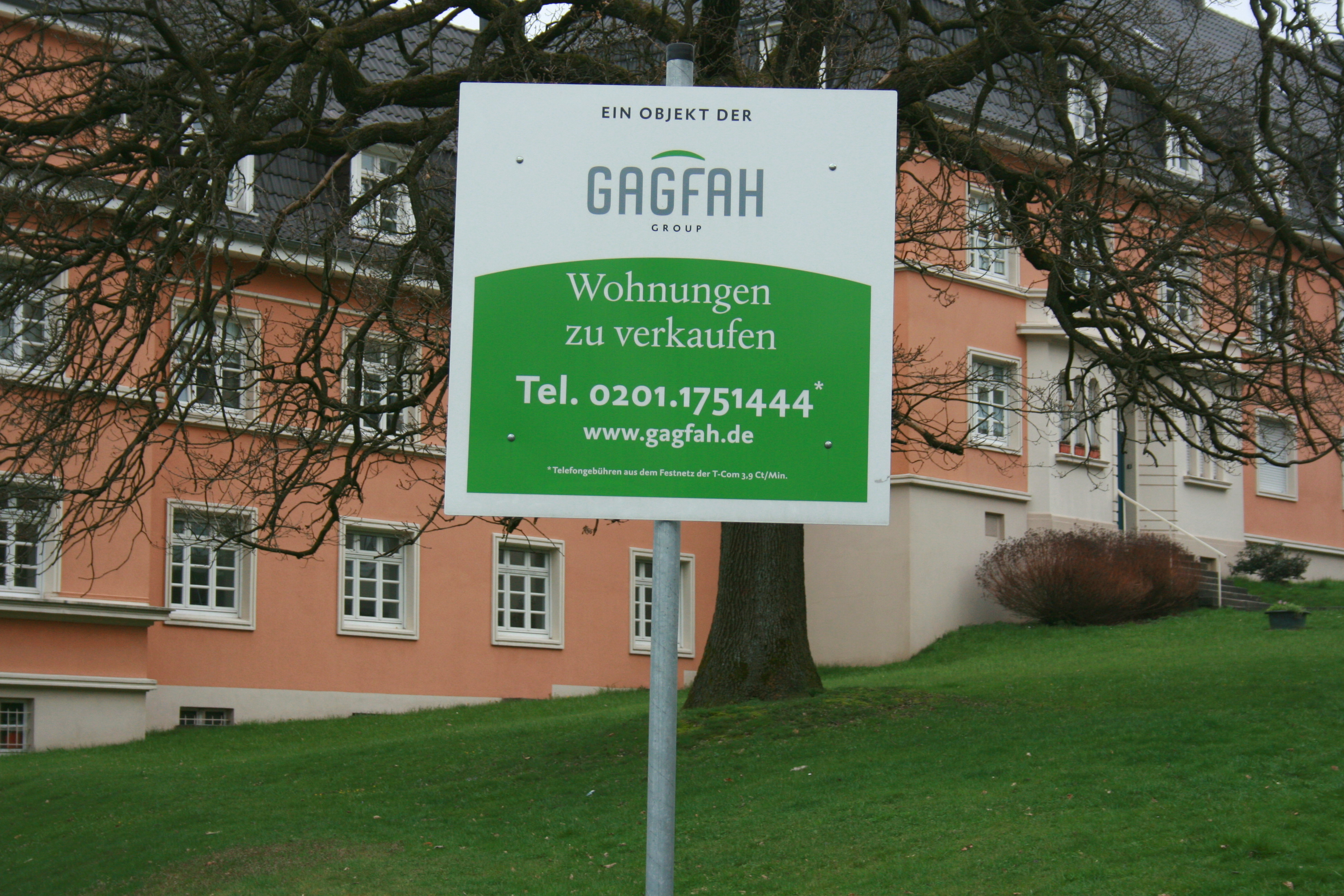 Siedlung Heimat in Wuppertal: Roebertstraße